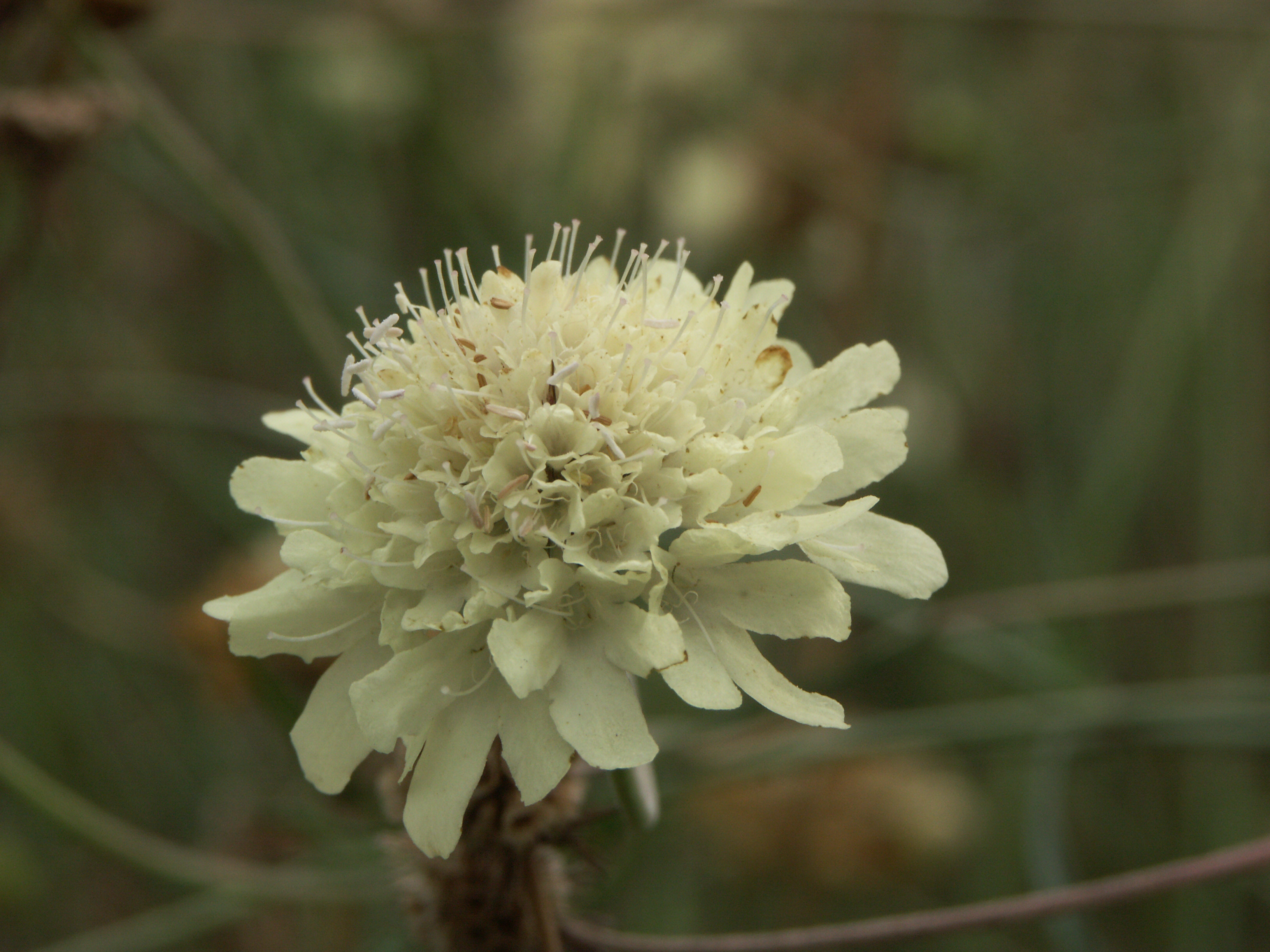 Gelbe Skabiose (Scabiosa ochroleuca), Botanischer Garten Berlin